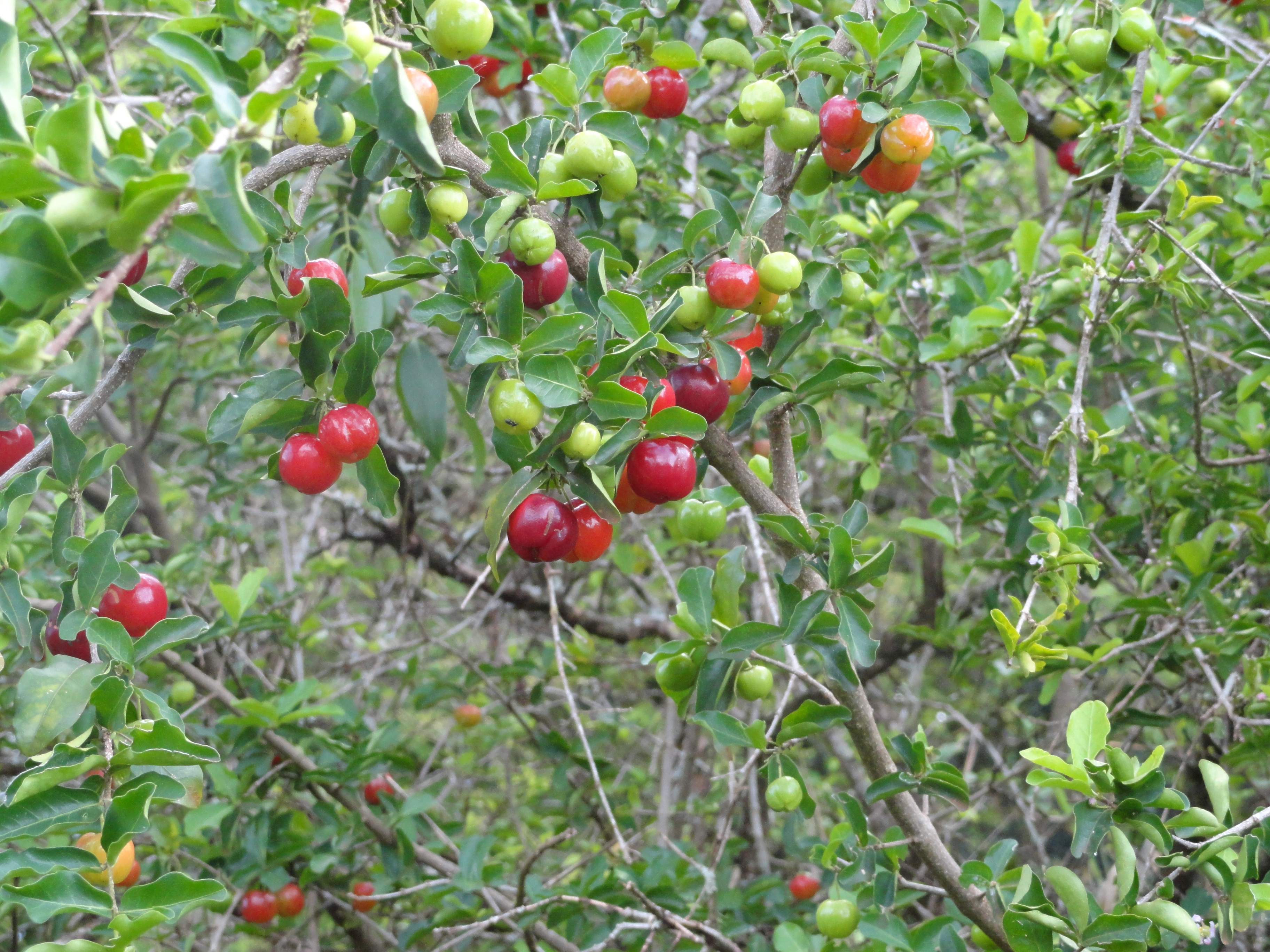 Acerola